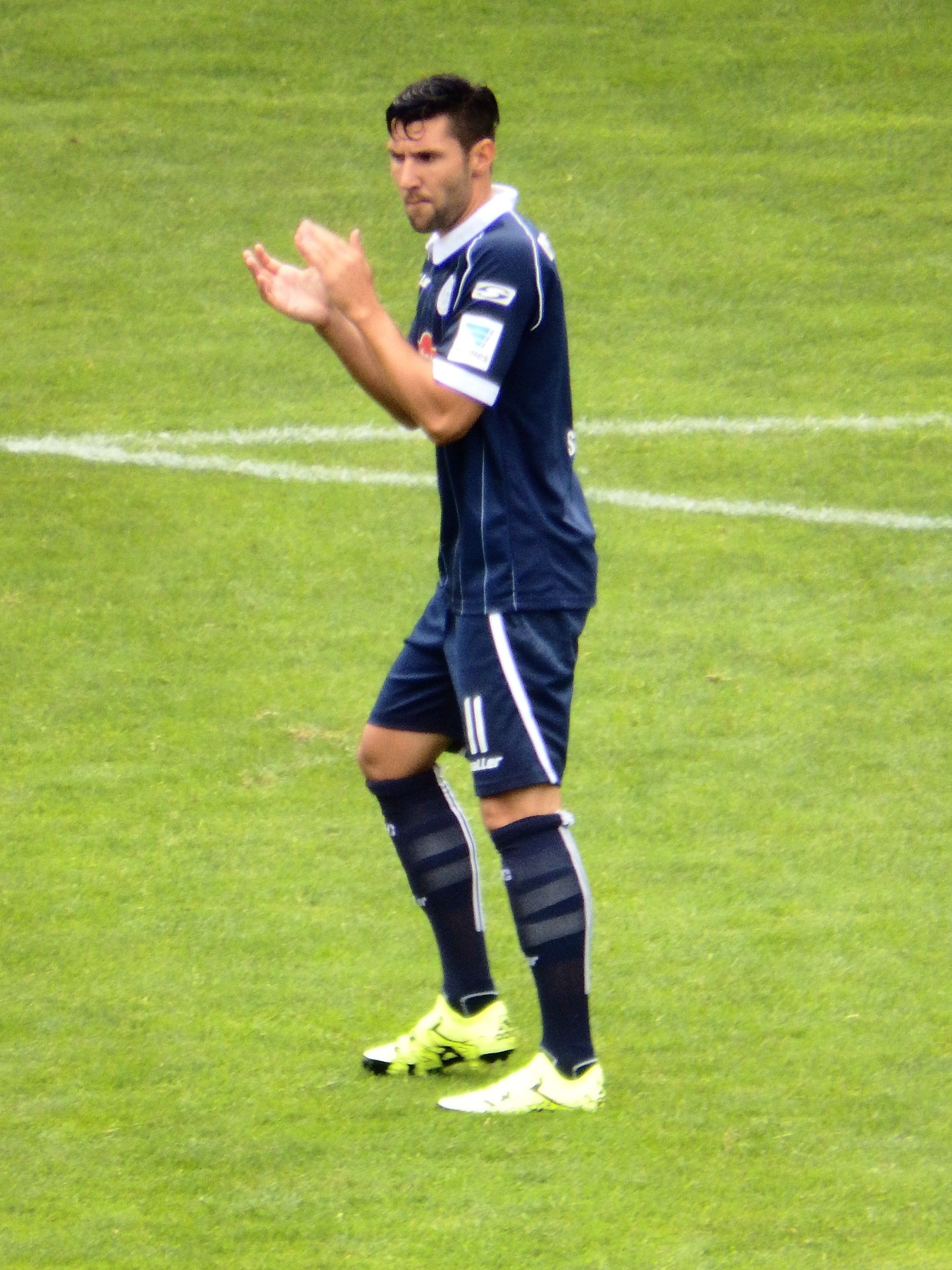 Salger, Stephan BIE